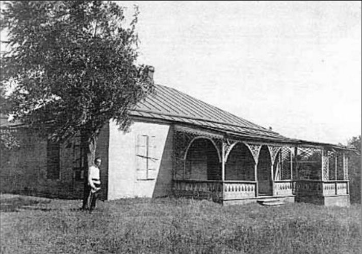 Таганрог. Дом Кукольника в Дубках